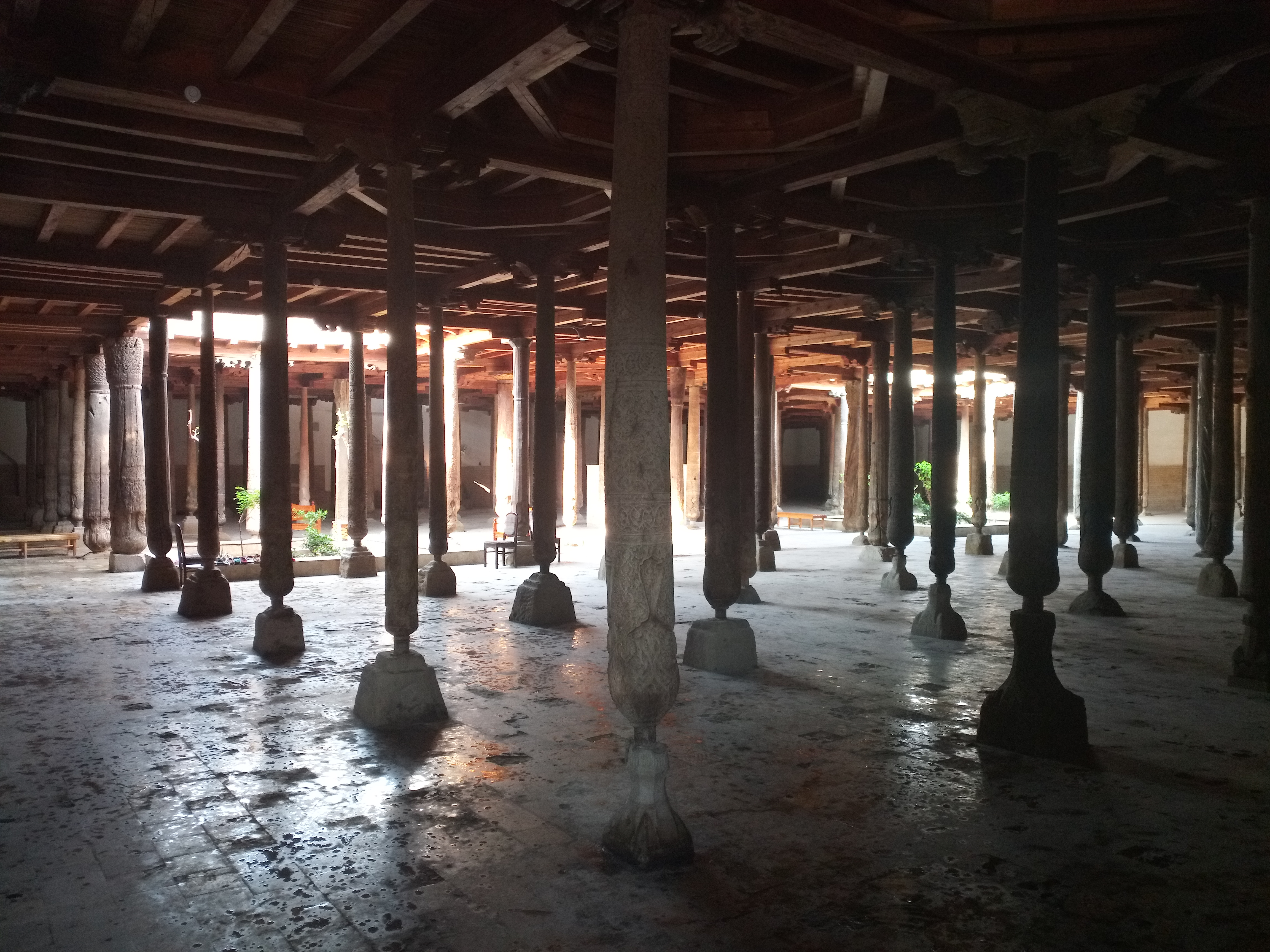 Dschuma Moschee, Chiwa, innen